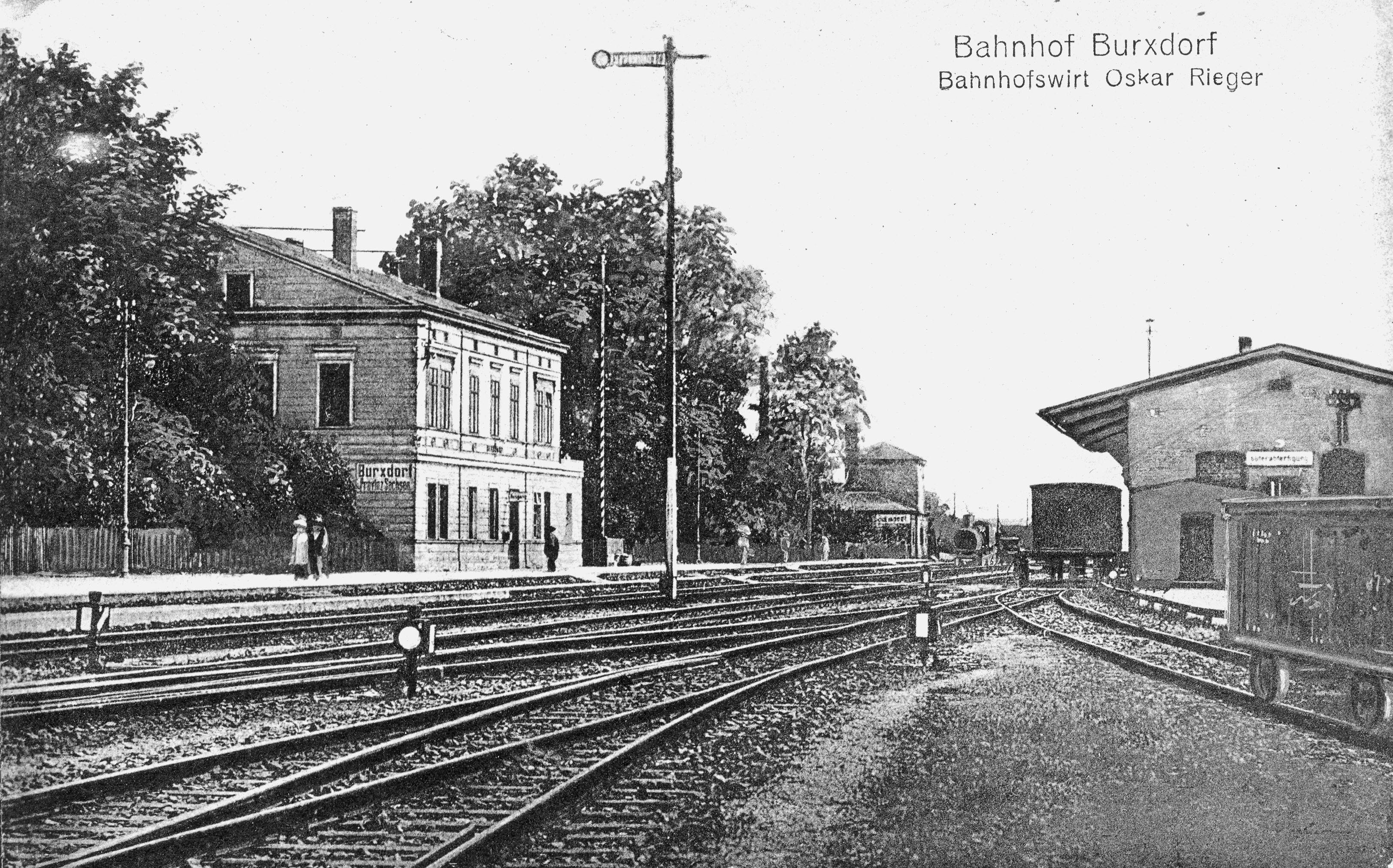 Neuburxdorfer Bahnhof um 1905